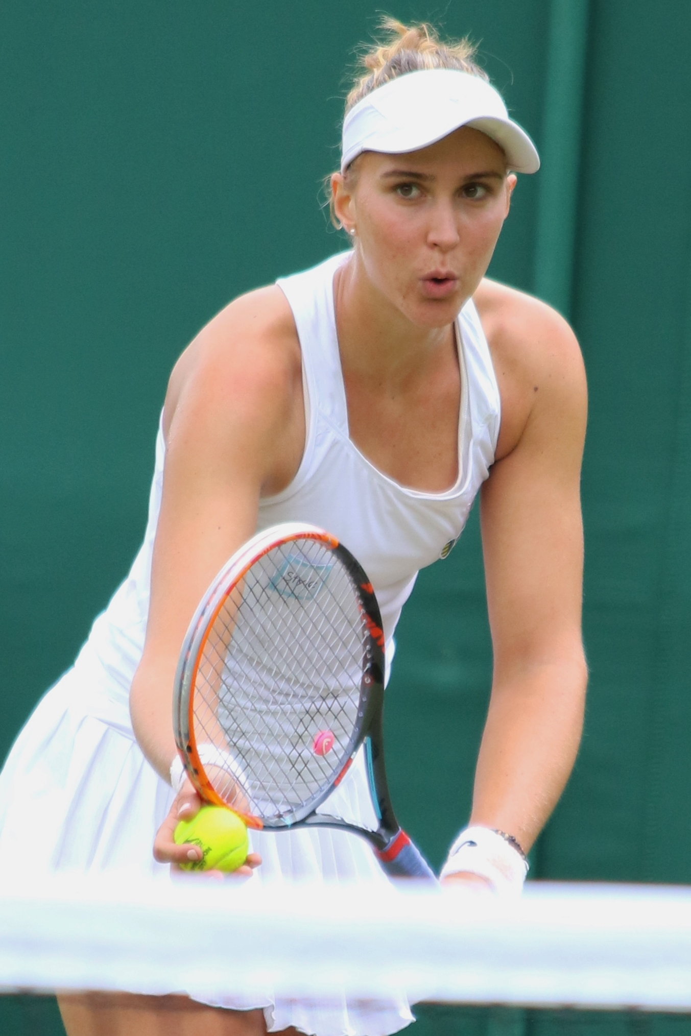 Haddad Maia WM17 (8)